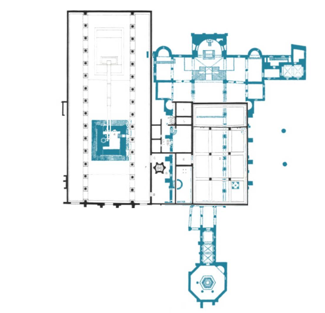 Basilica di Aquileia, Post Theodorian, late IVth century, without papal palace (which was added early Vth century)